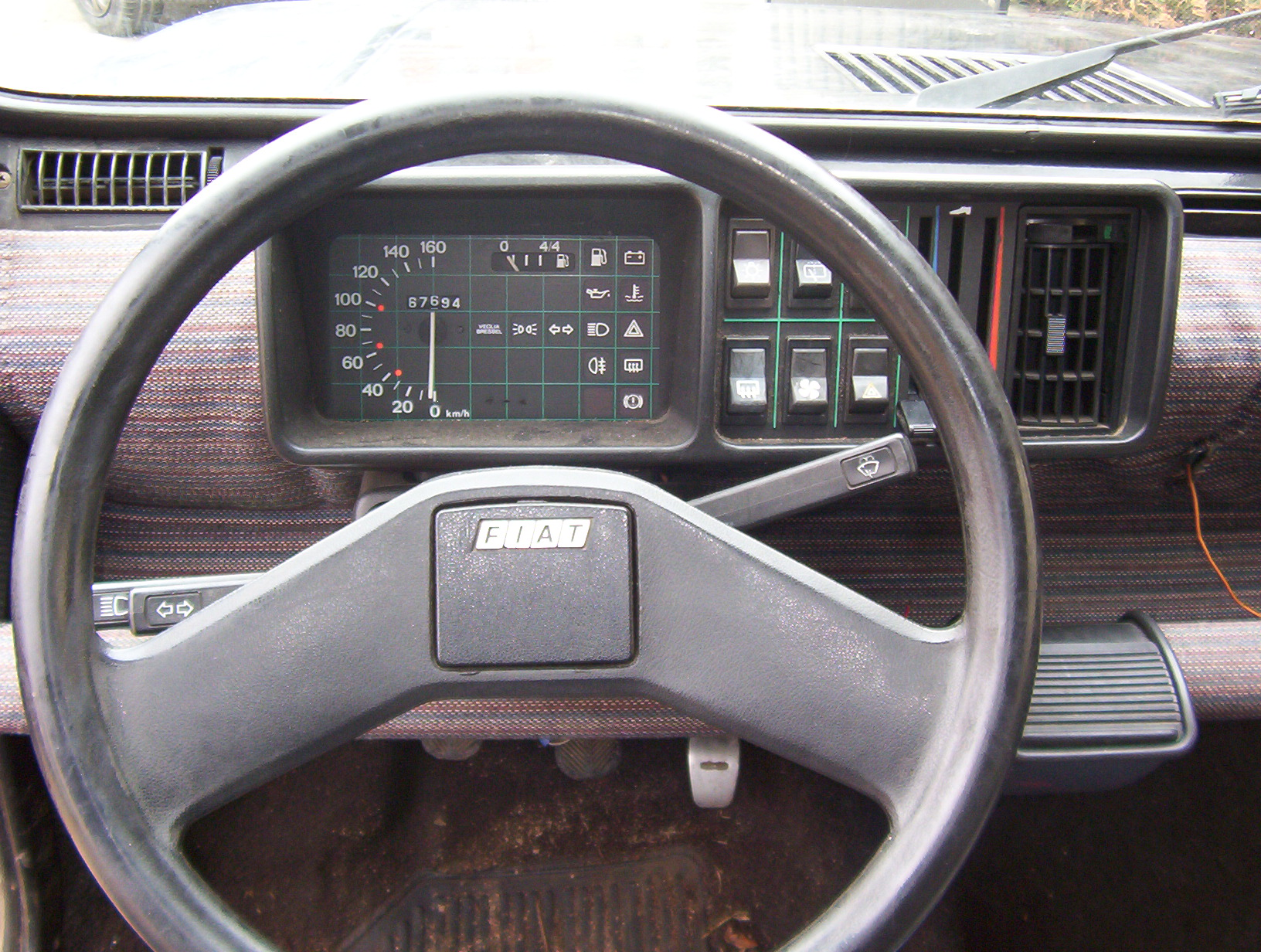 Tableau de bord de Panda série 1